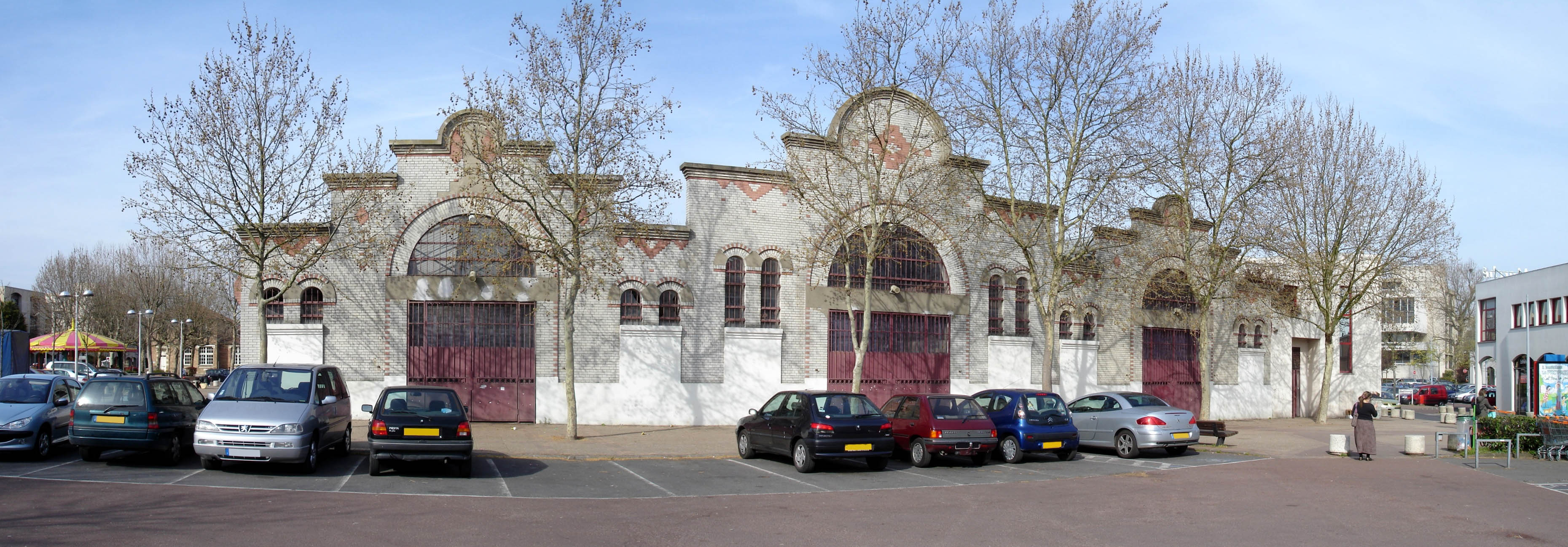 Le marché à Eaubonne (Val-d'Oise), France